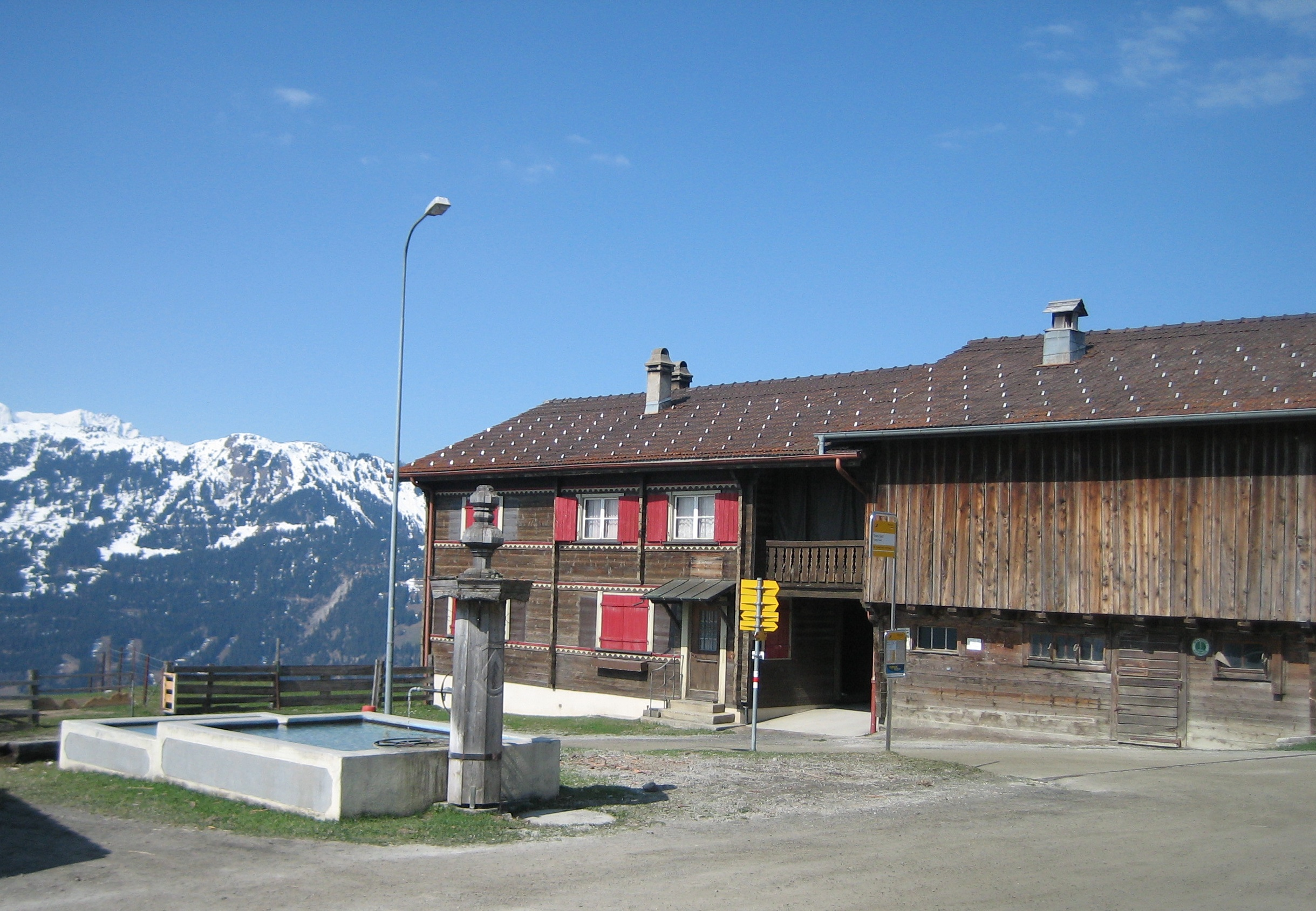 Brunnen in Trans, Dorf in der Gemeinde Tumegl/Tomils